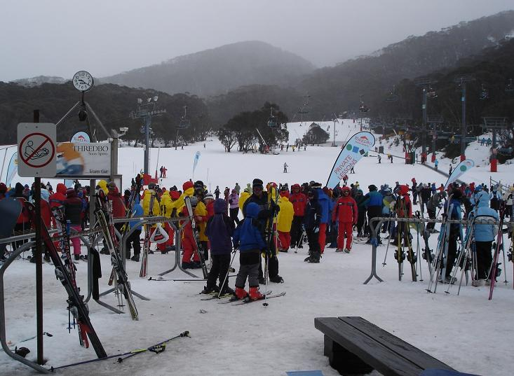 Aula de esqui na estaÃ§Ã£o de esqui de Thredbo, NSW, AustrÃ¡lia. Foto de autoria do usuÃ¡rio wikipedia Athaydesbr.